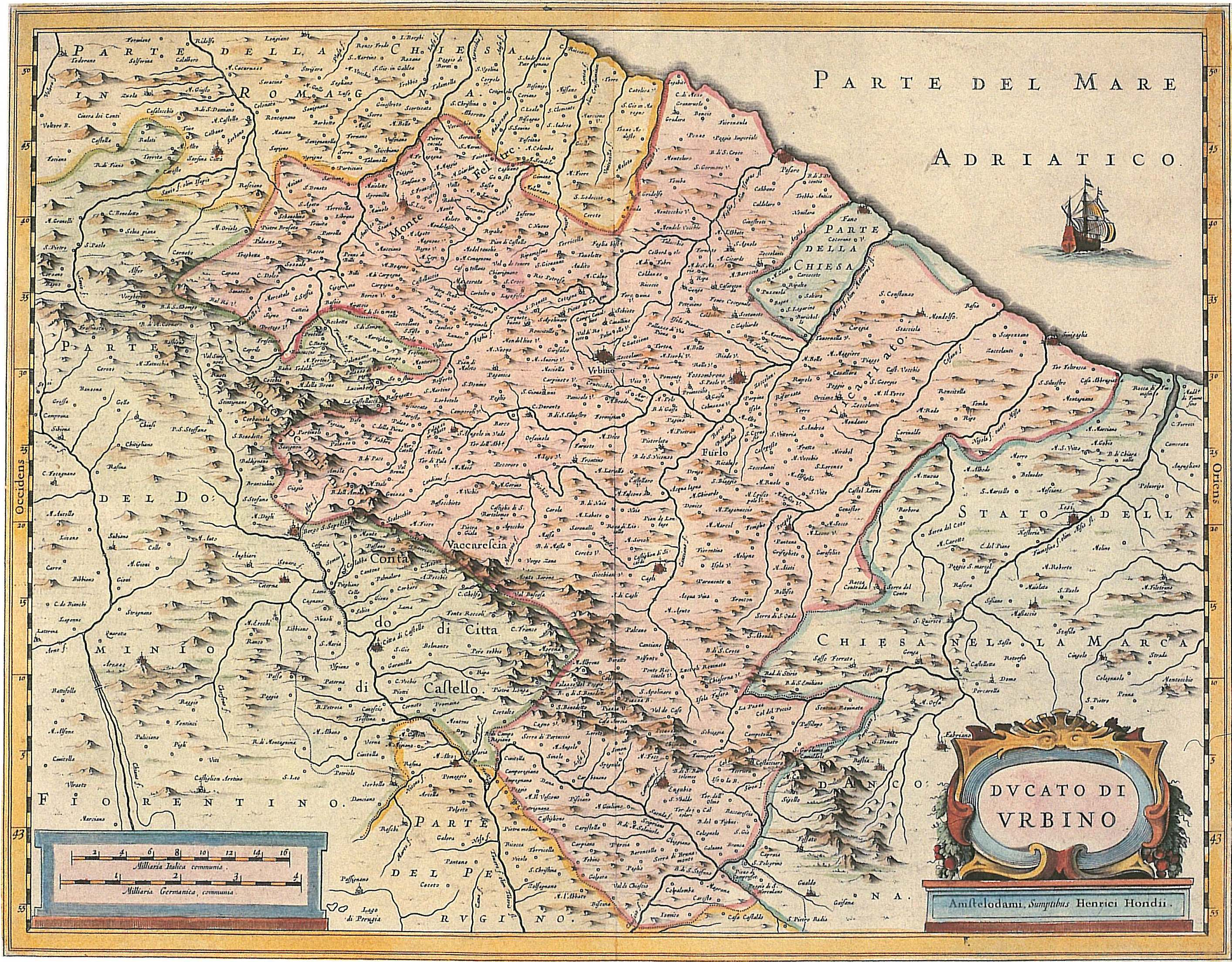 Ducato di Urbino, 1635 - Henricus Hondius, Jan Jansson edita in Theatrum Italiae, Amsterdam, 1635 (mm 380x490, Cartoteca storica delle Marche)